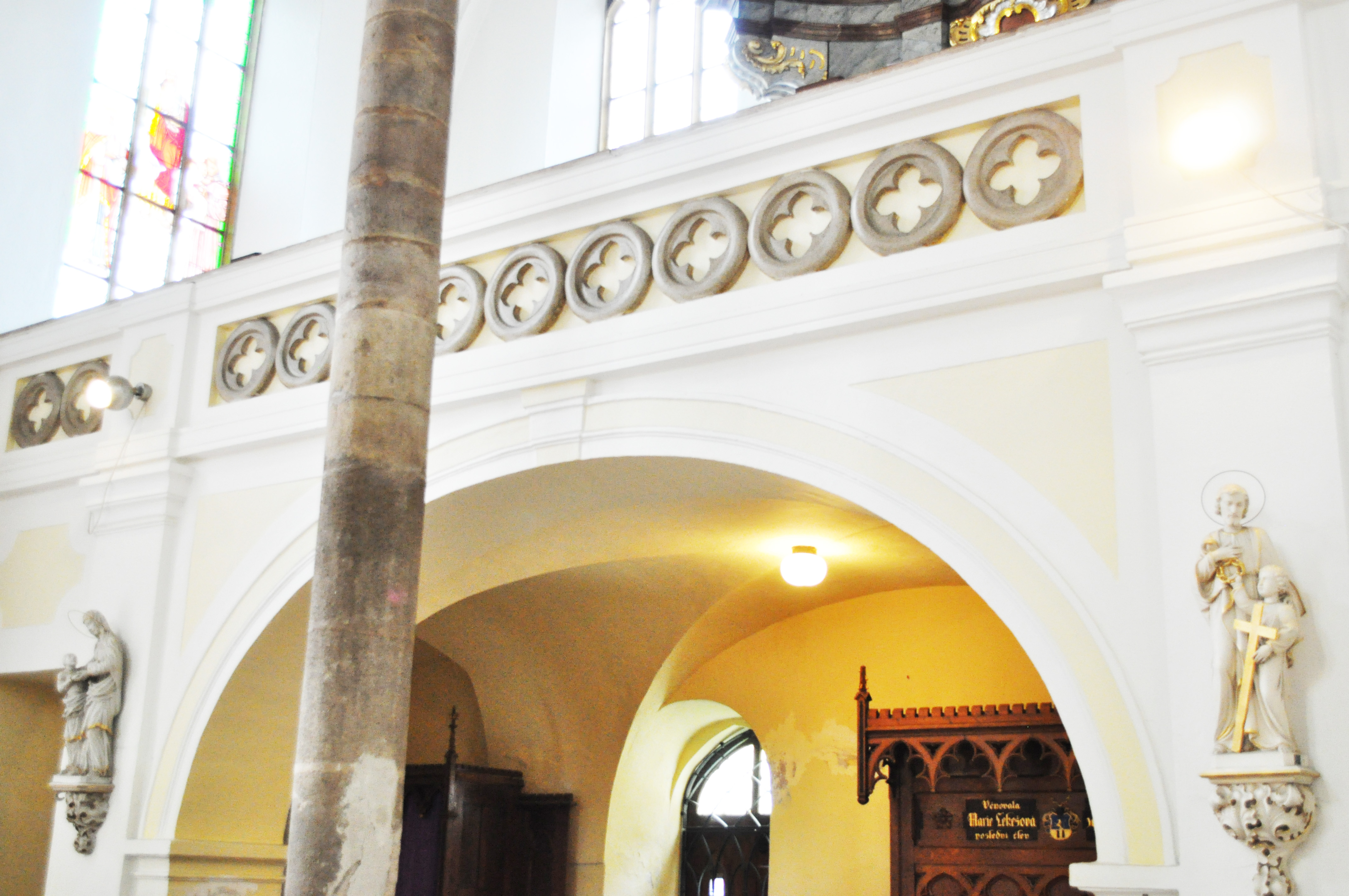 Pohled z hlavní lodi na kúr